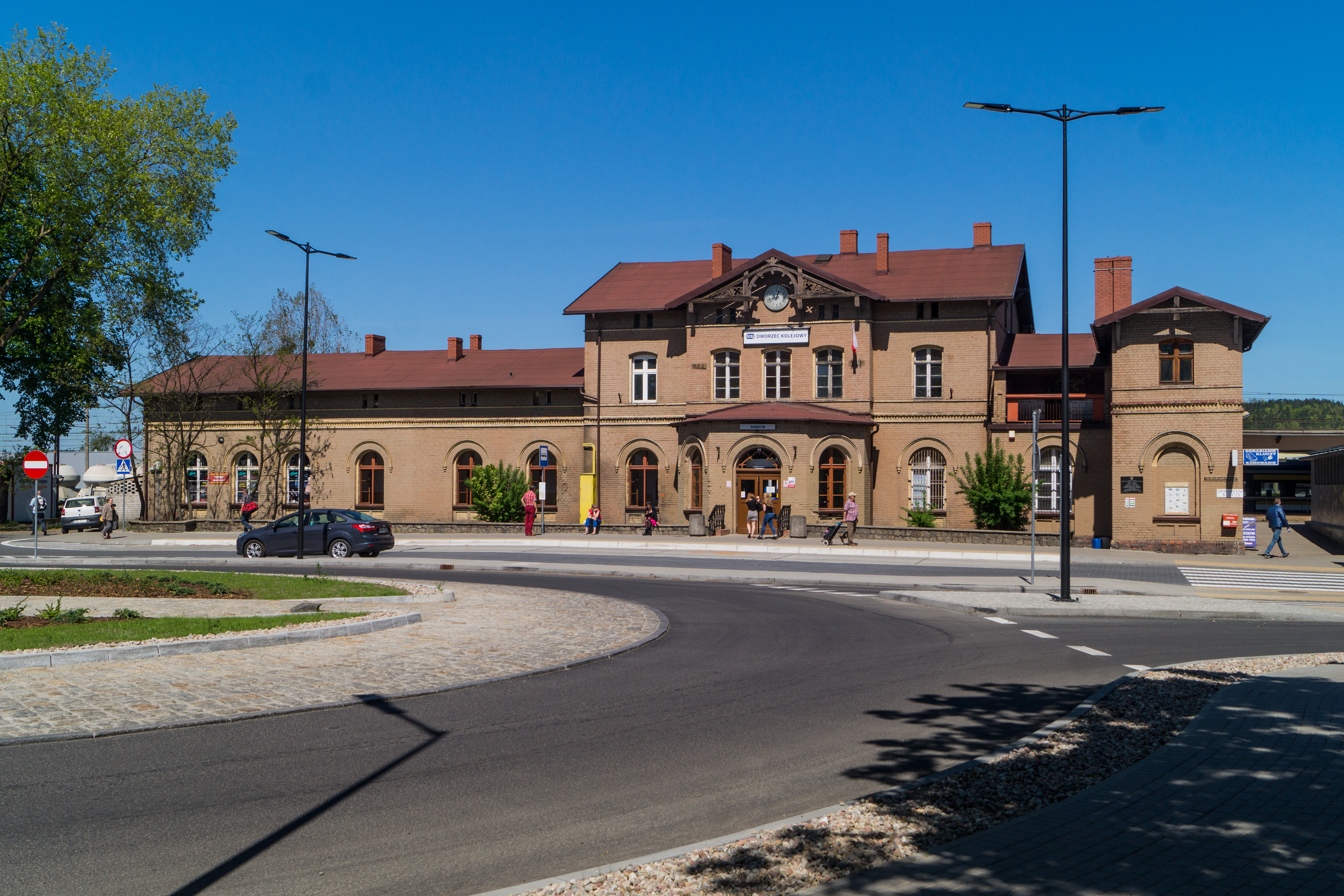 Dworzec PKP w Wejherowie wraz z nowym układem drogowym.